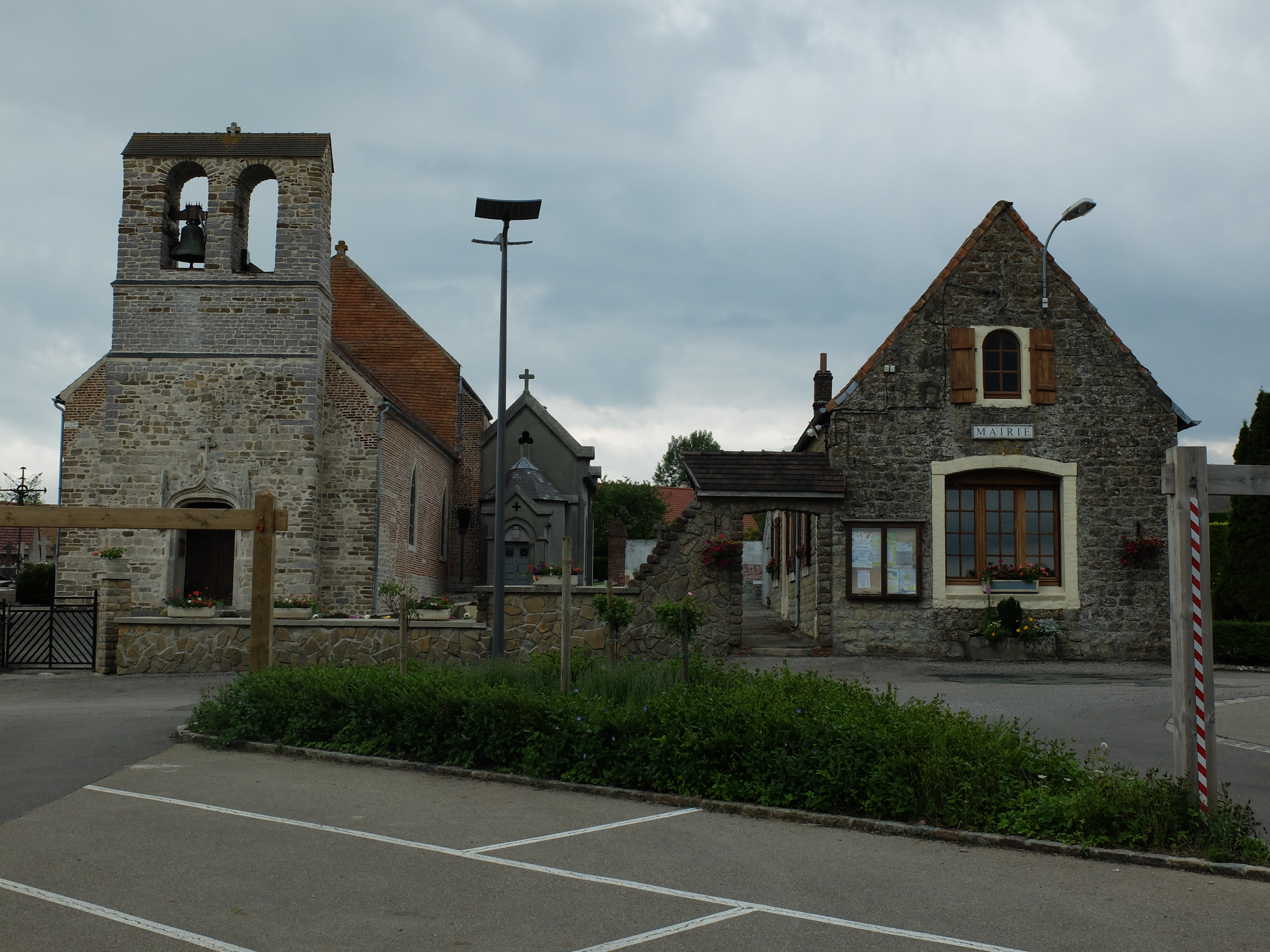 Vue de la rue de l'église de Bellebrune : l'église et la mairie figurent sur l'image.